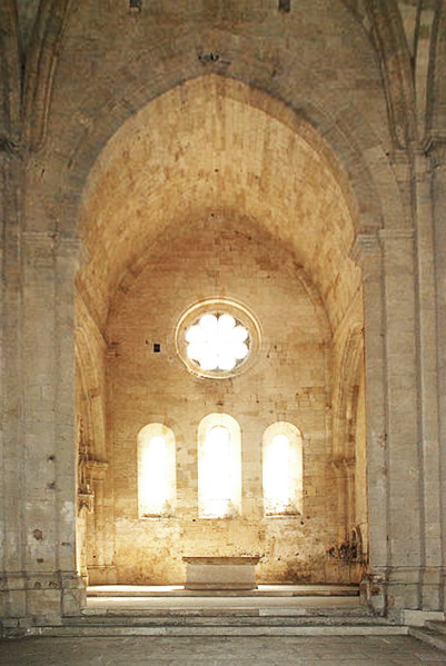 Abbaye de Silvacane, choeur